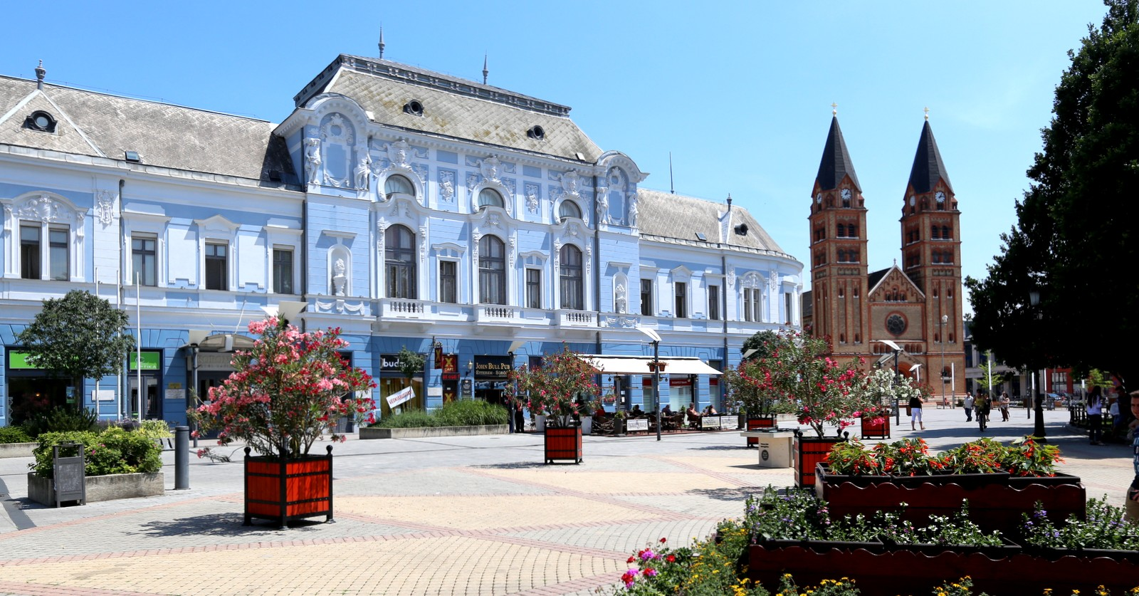 Nyíregyháza, Korona Hotel